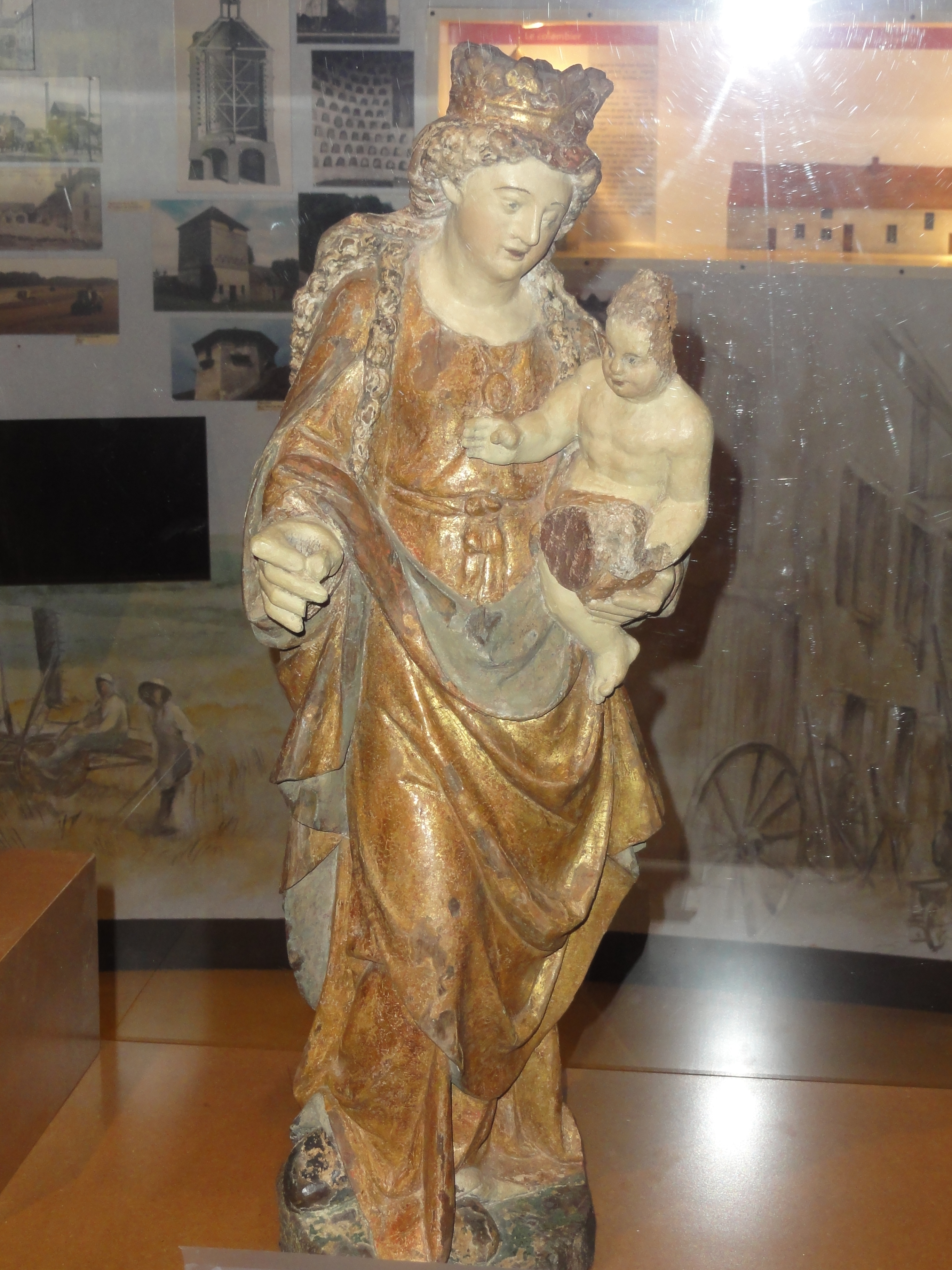 Vierge à l'Enfant provenant de l'église de Mézières, seconde moitié du XVIe siècle.